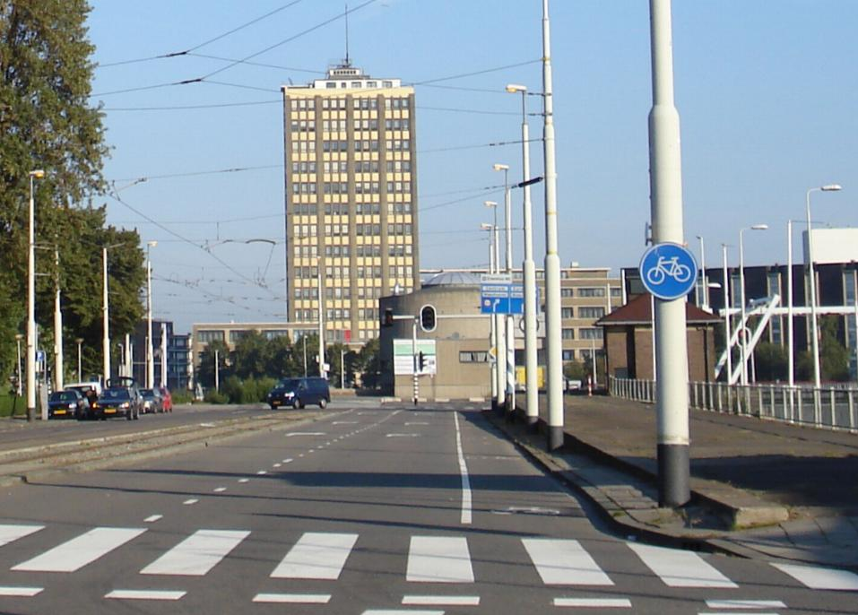 Puntegaalstraat, straat in Rotterdam.